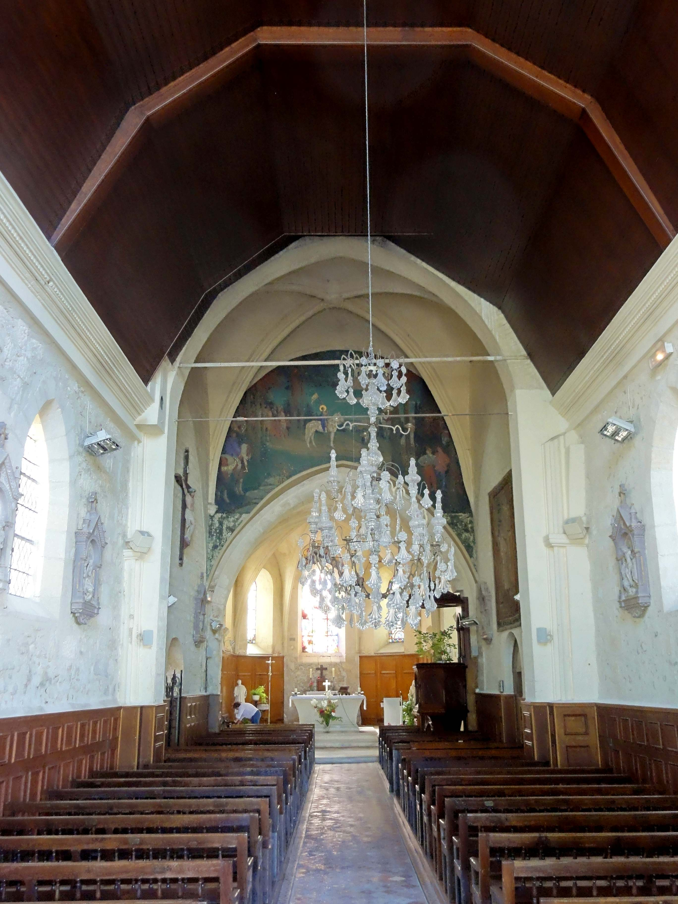 Intérieur de l'église (voir titre).